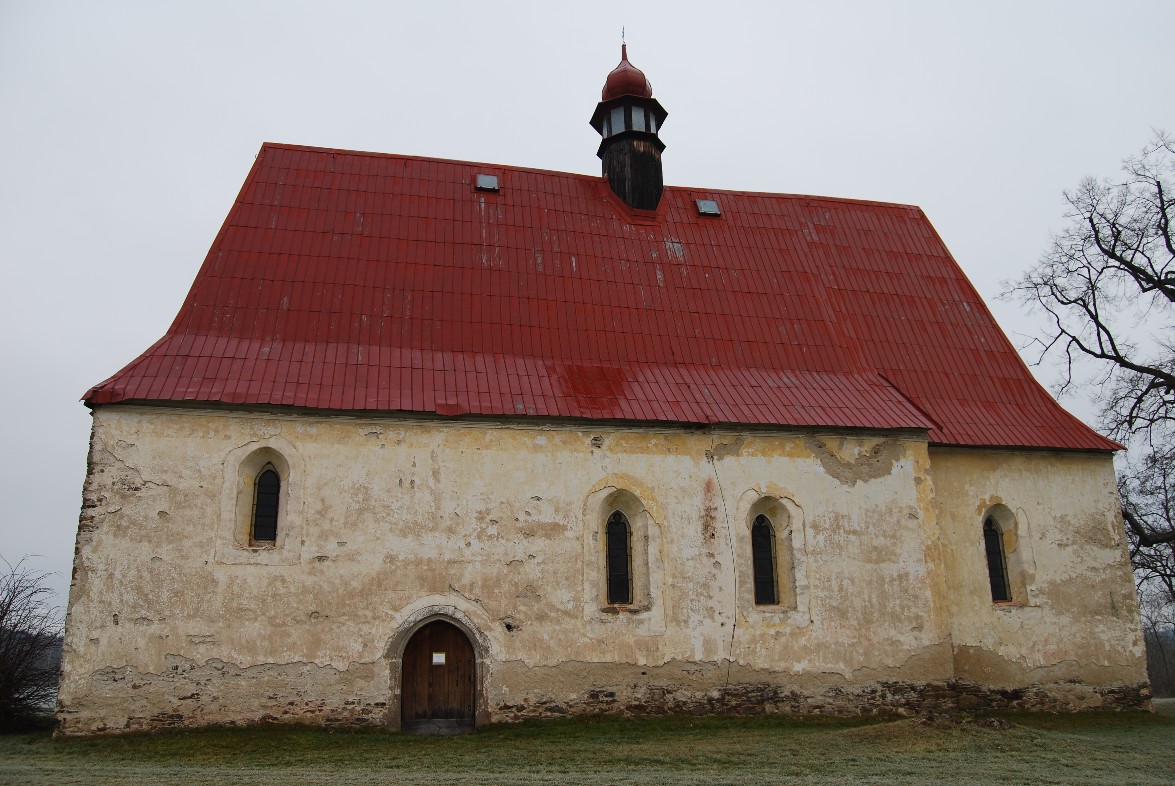 Kostel Nanebevzetí Panny Marie. Dobronice u Bechyně se nachází v okrese Tábor, kraj Jihočeský. Česká republika. - Google Maps - Google Earth